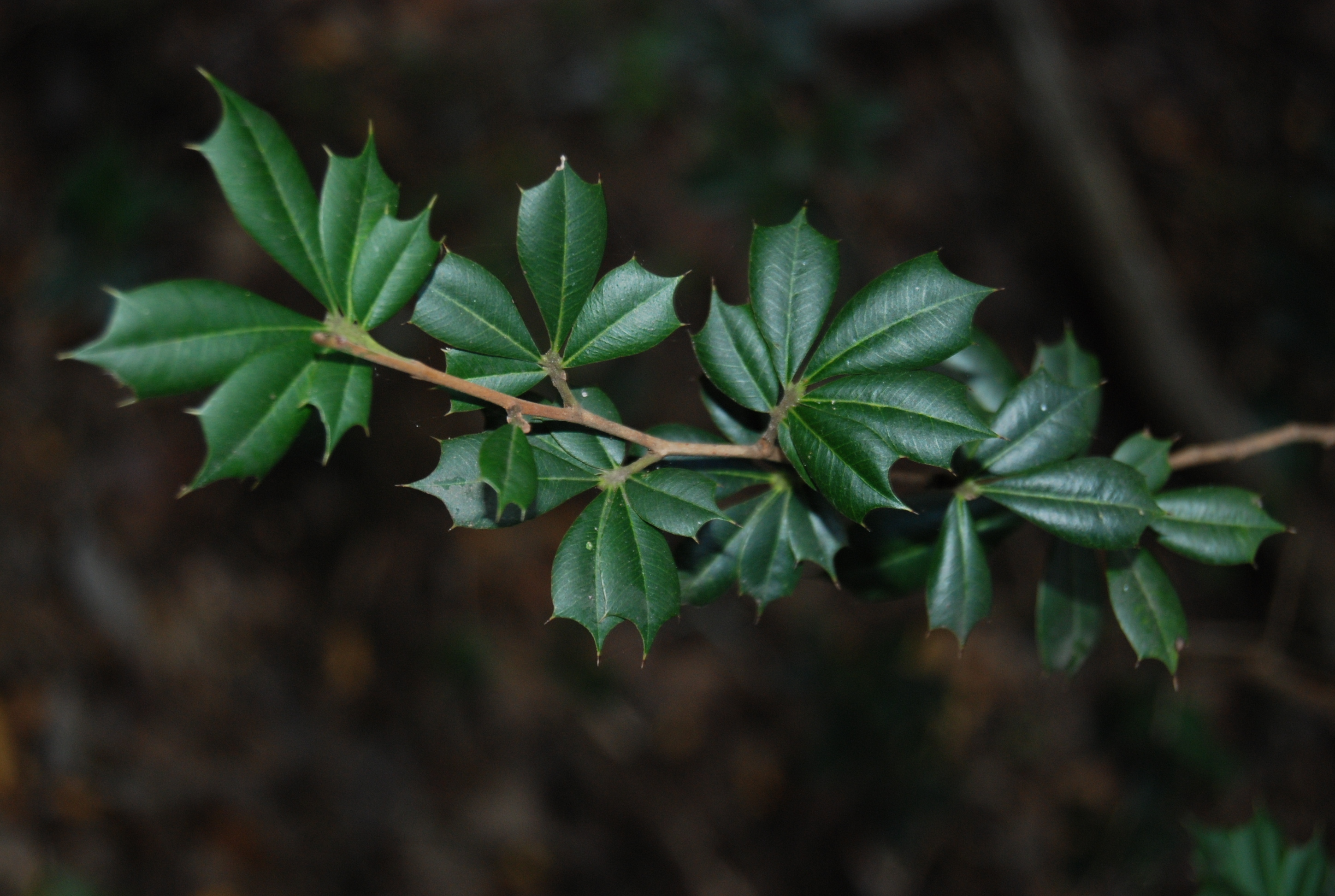 Trichilia triacantha Photo date: 01-30-2008 Location: Ponce, Puerto Rico